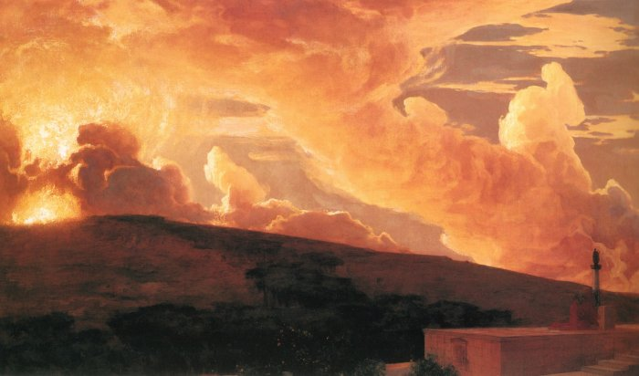 Clytie